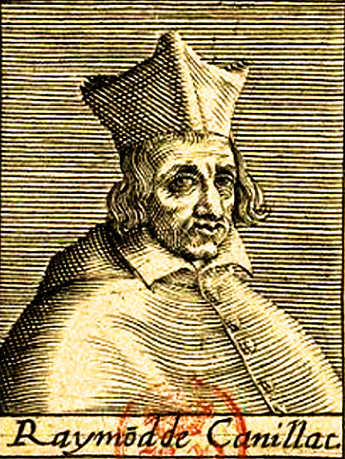 Cardinal Raymond de Canillac